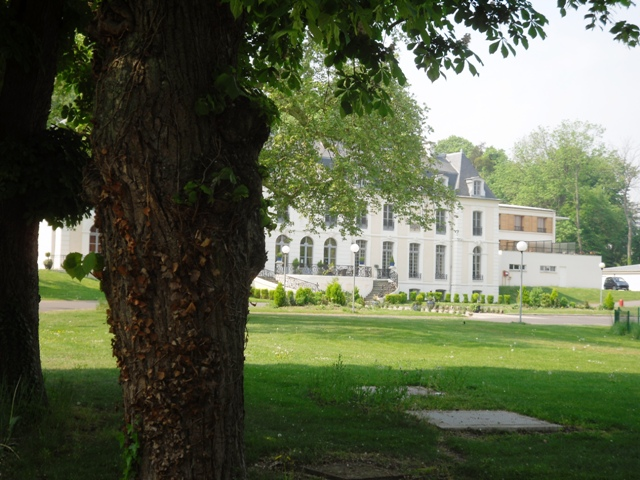 Le château Dranem à Ris-Orangis (91)